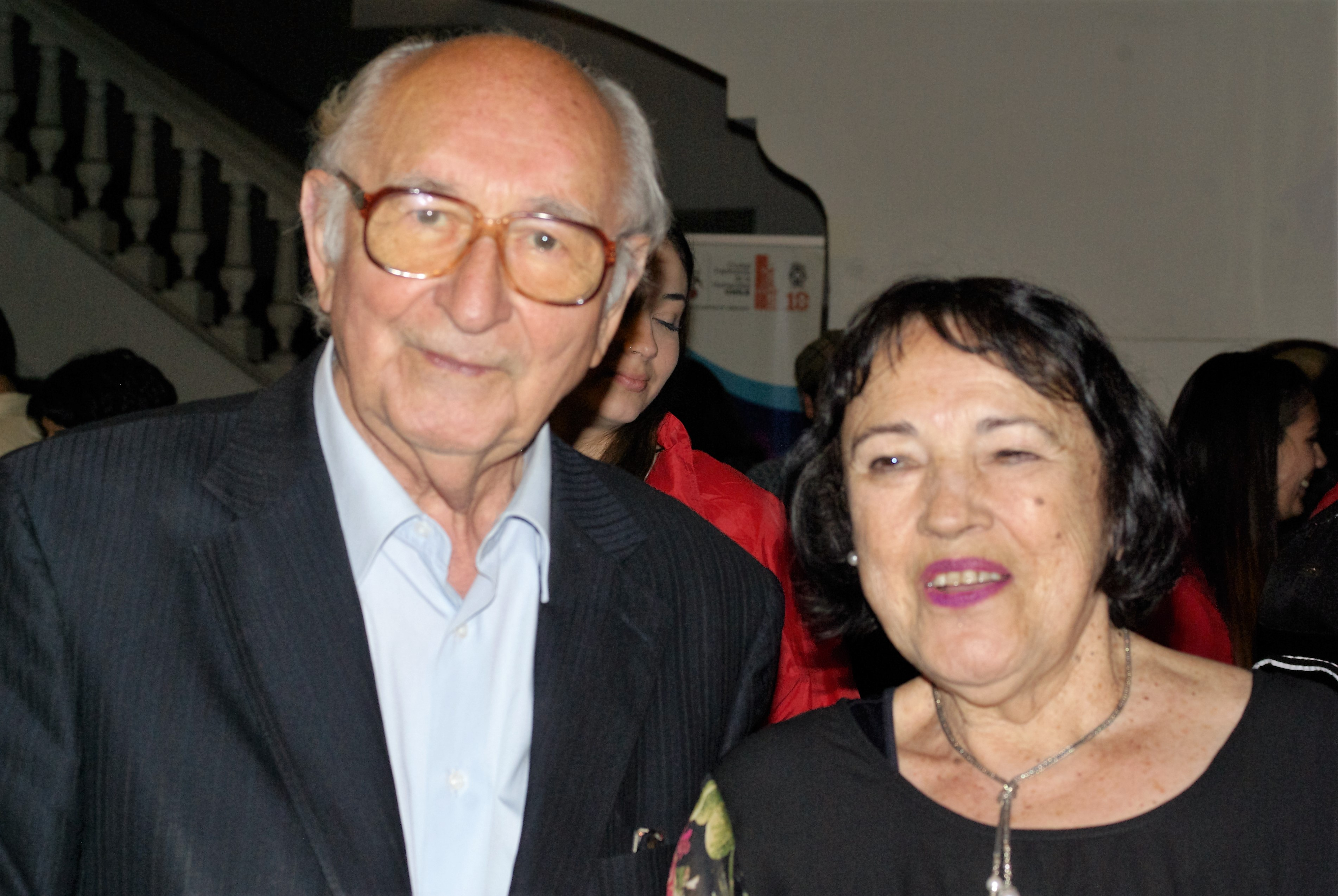 El poeta chileno Pedro Lastra en el festival Puerto de Ideas 2016, Valparaíso